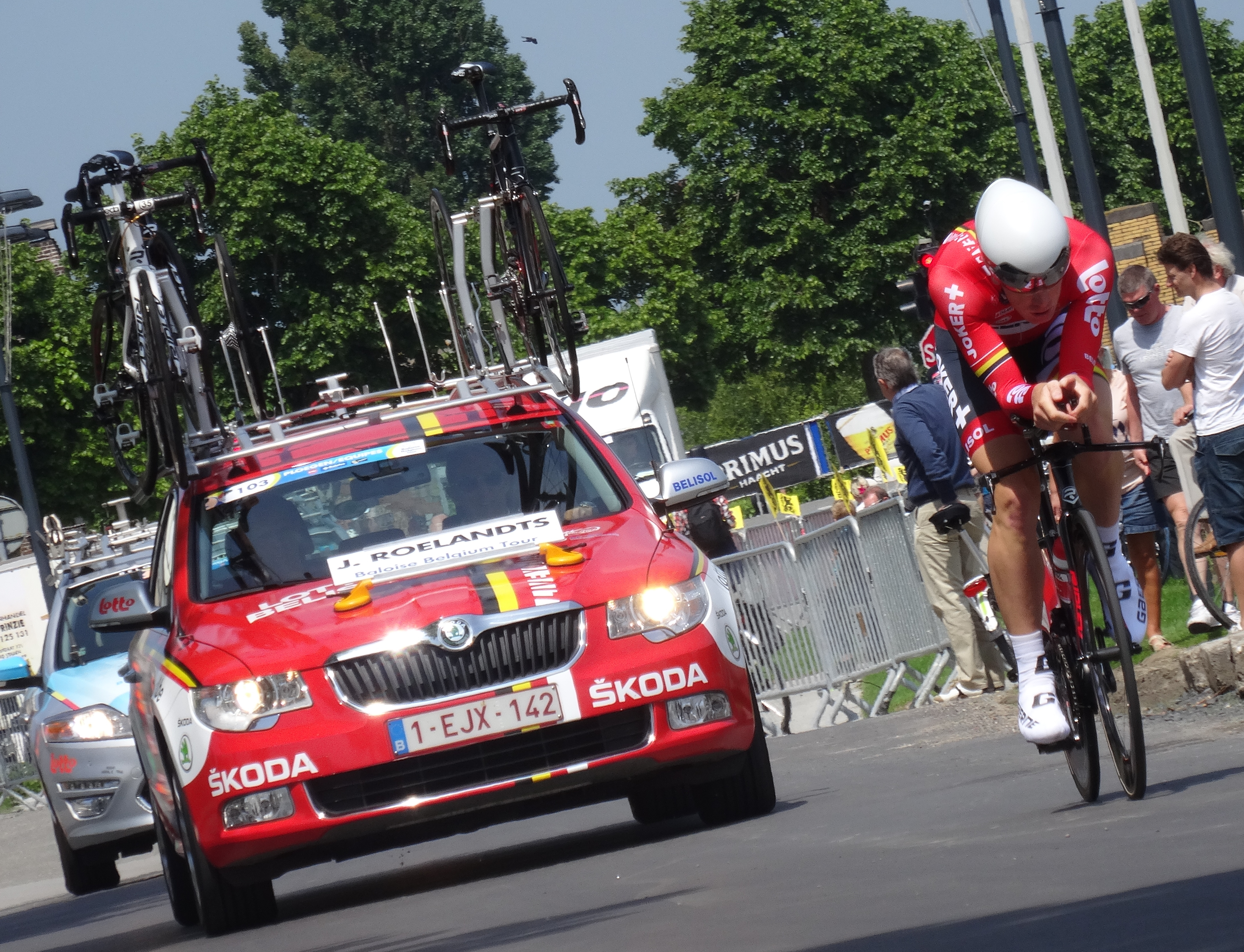 Reportage photographique réalisé le vendredi 30 mai à l'occasion du contre-la-montre individuel de la troisième étape du Tour de Belgique 2014 à Dixmude, Belgique.